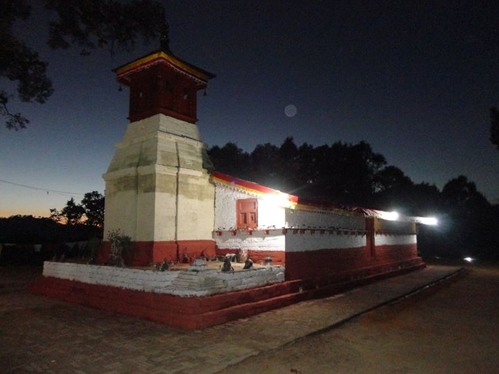 दार्चुला